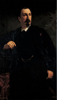 Portrait d'Edouard André réalisé en 1872 par Nélie Jacquemart, huile sur toile conservée au Musée Jacquemart-André